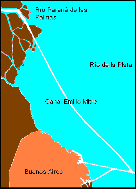 esquema del trazado del canal Emilio Mitre. Argentina